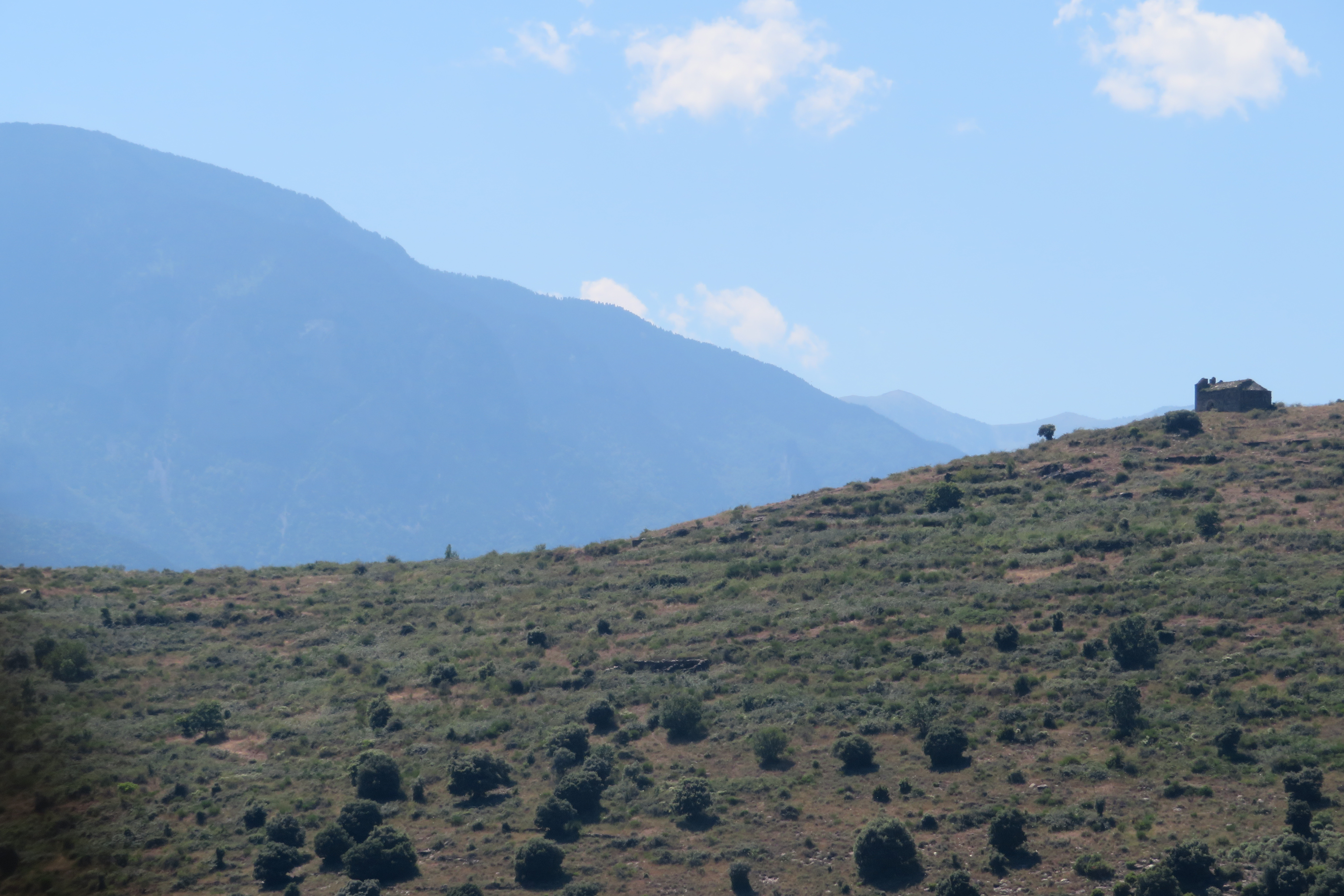 Église Sainte-Marguerite de Nabilles depuis Llugols